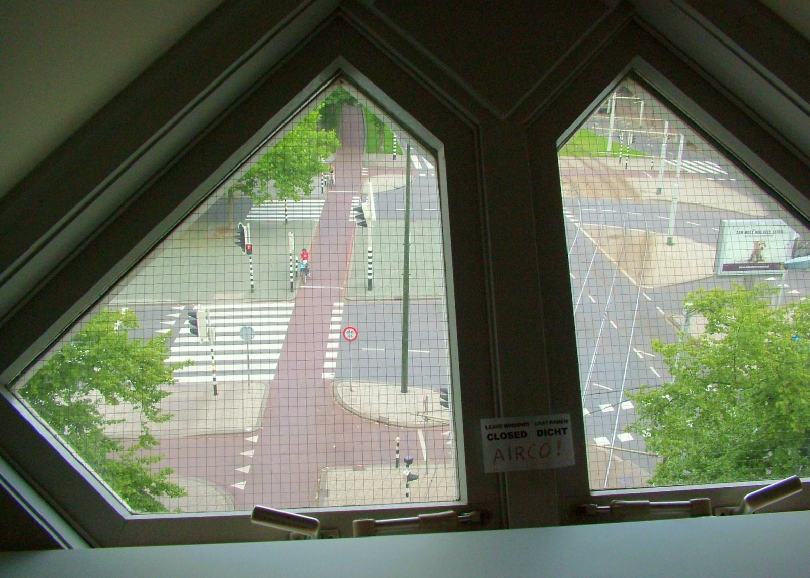 Blik uit kubushuis, Rotterdam.